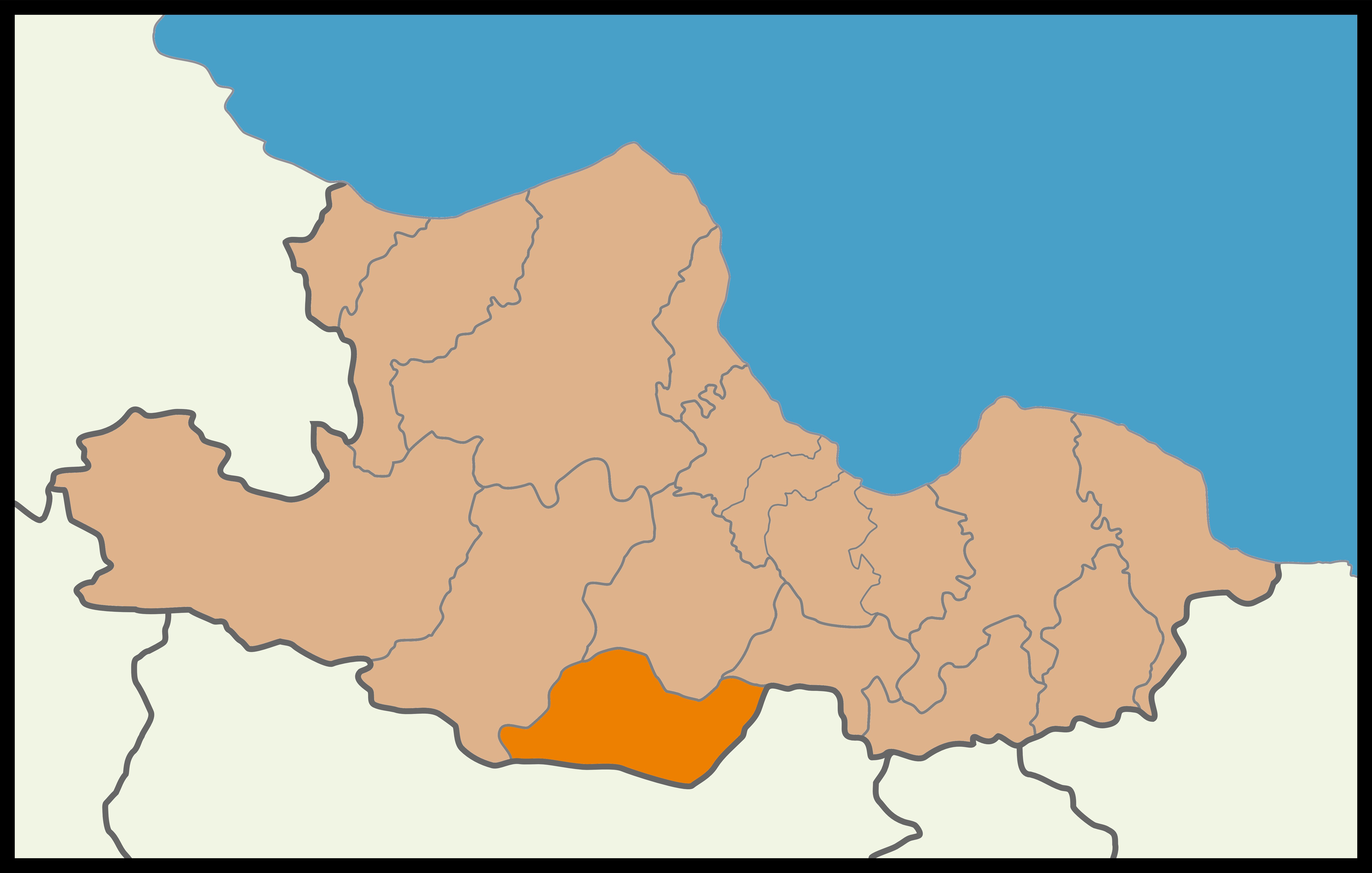 Samsun'un Ladik ilçesinin 2015 Türkiye genel seçimleri haritası.